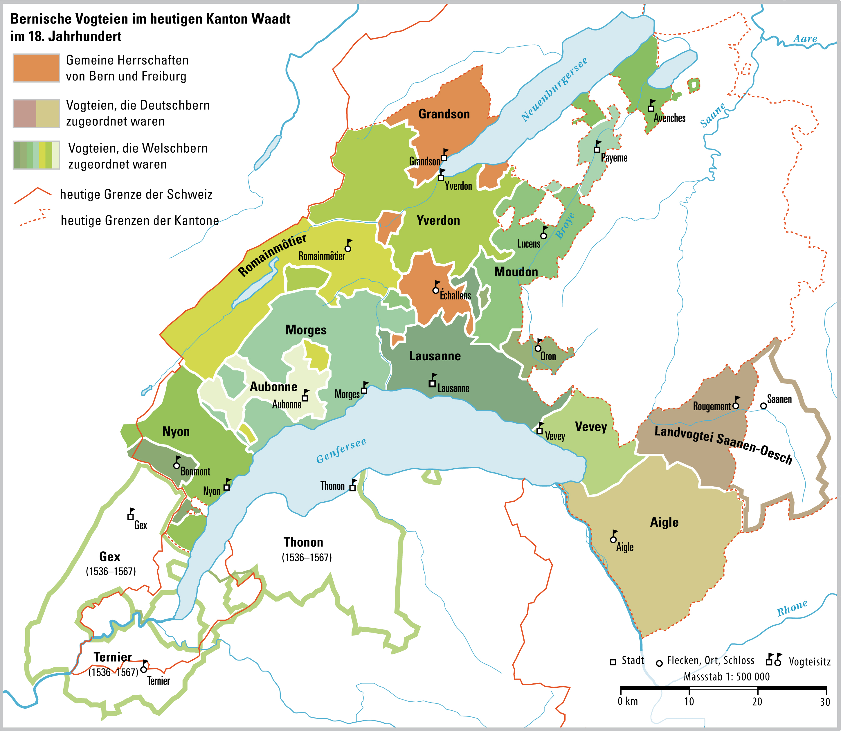 Karte der Vogteien der Republik Bern auf dem Gebiet des heutigen Kantons Waadt im 18. Jahrhundert.